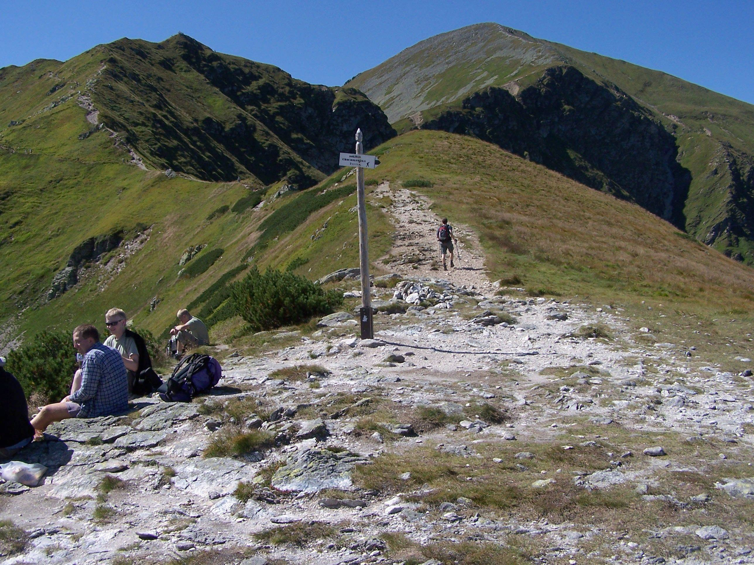 Siwa Przełęcz (Tatra Mountains, Ornak )